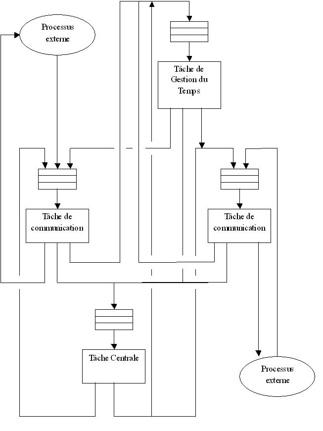 schema de synthese échanges entre tâches